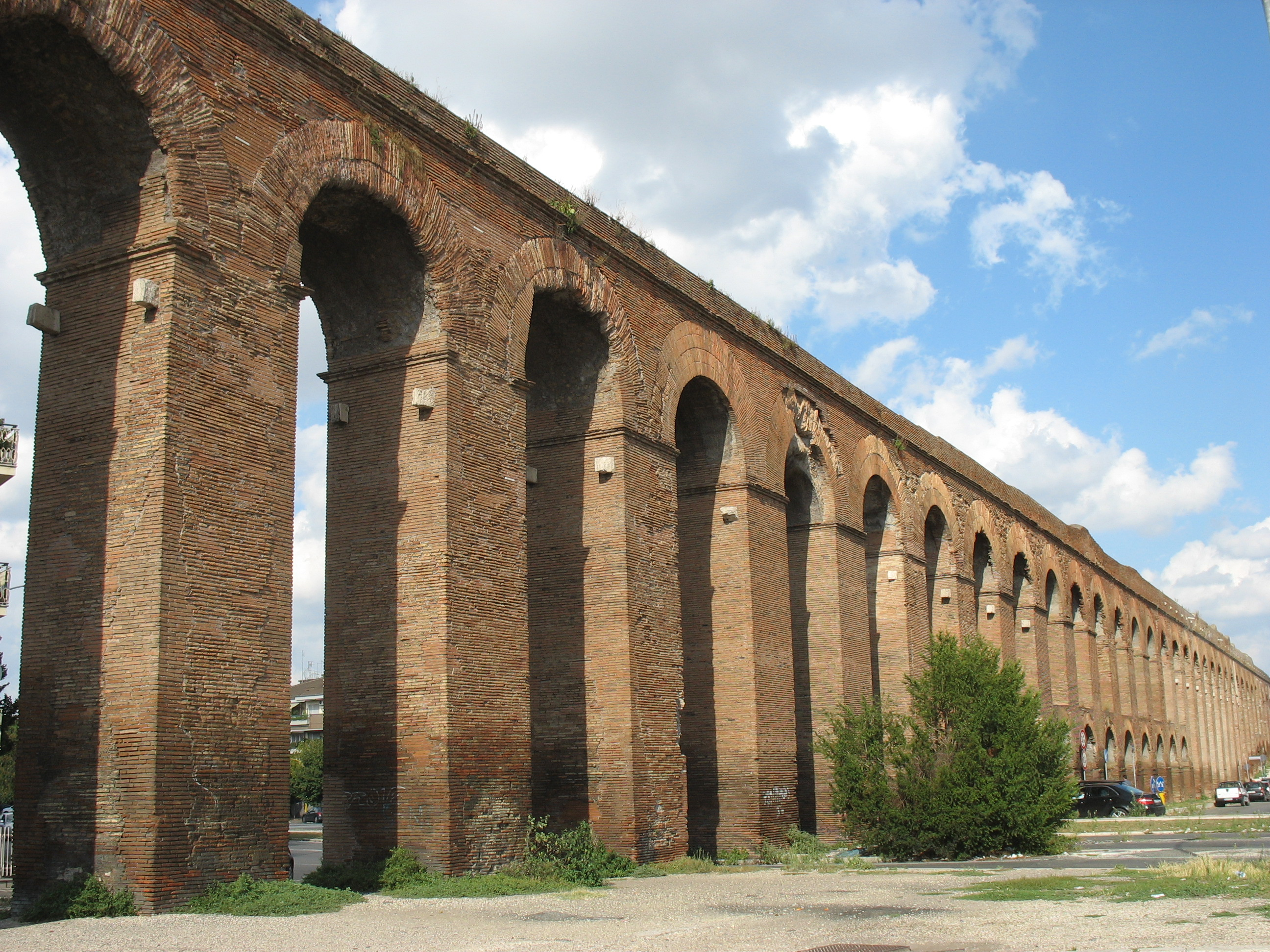 Acquedotto Alessandrino This is a photo of a monument which is part of cultural heritage of Italy.